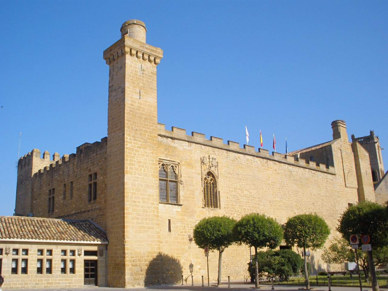 Castillo Viejo-Parador Nacional Principe de Viana (Olite, Navarra)